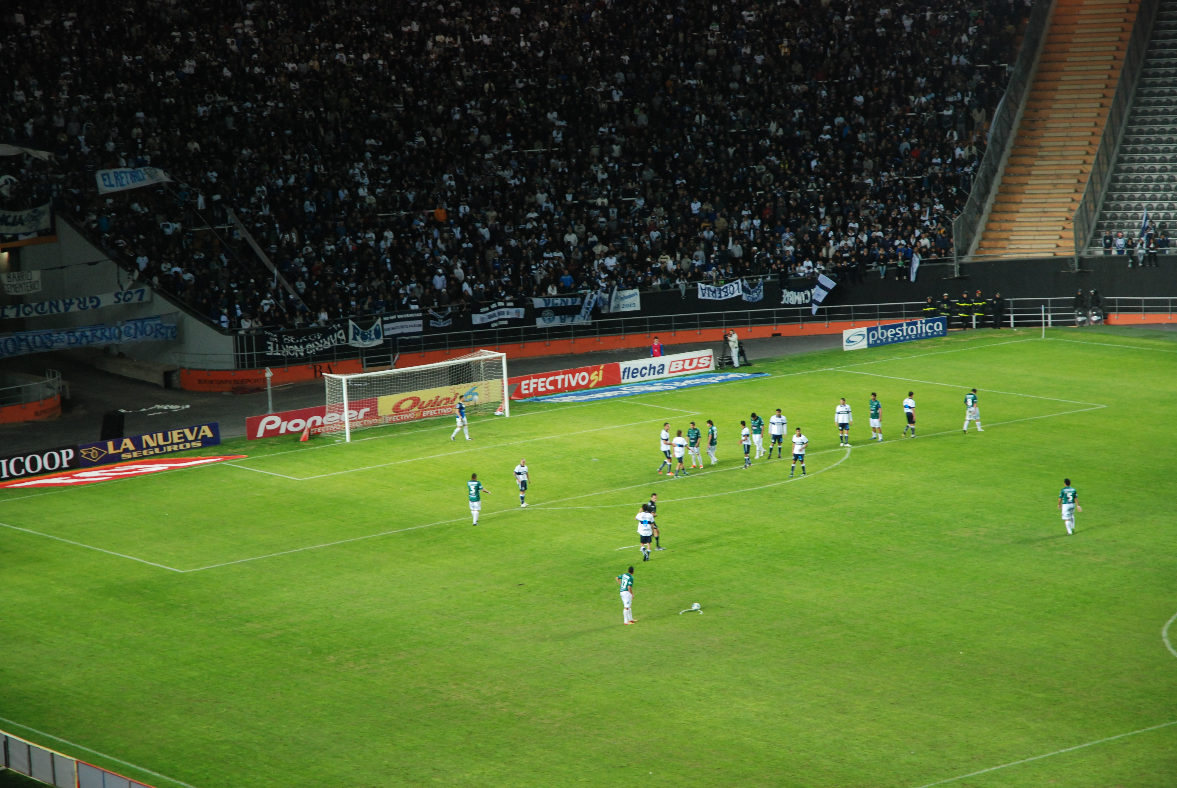 Partido de fútbol entre los clubes Gimnasia y Esgrima La Plata (local) y Sarmiento de Junín (visitante) en el Estadio Ciudad de La Plata, el 15 de junio de 2013, correspondiente a la última fecha del campeonato de Primera B Nacional 2012-2013.